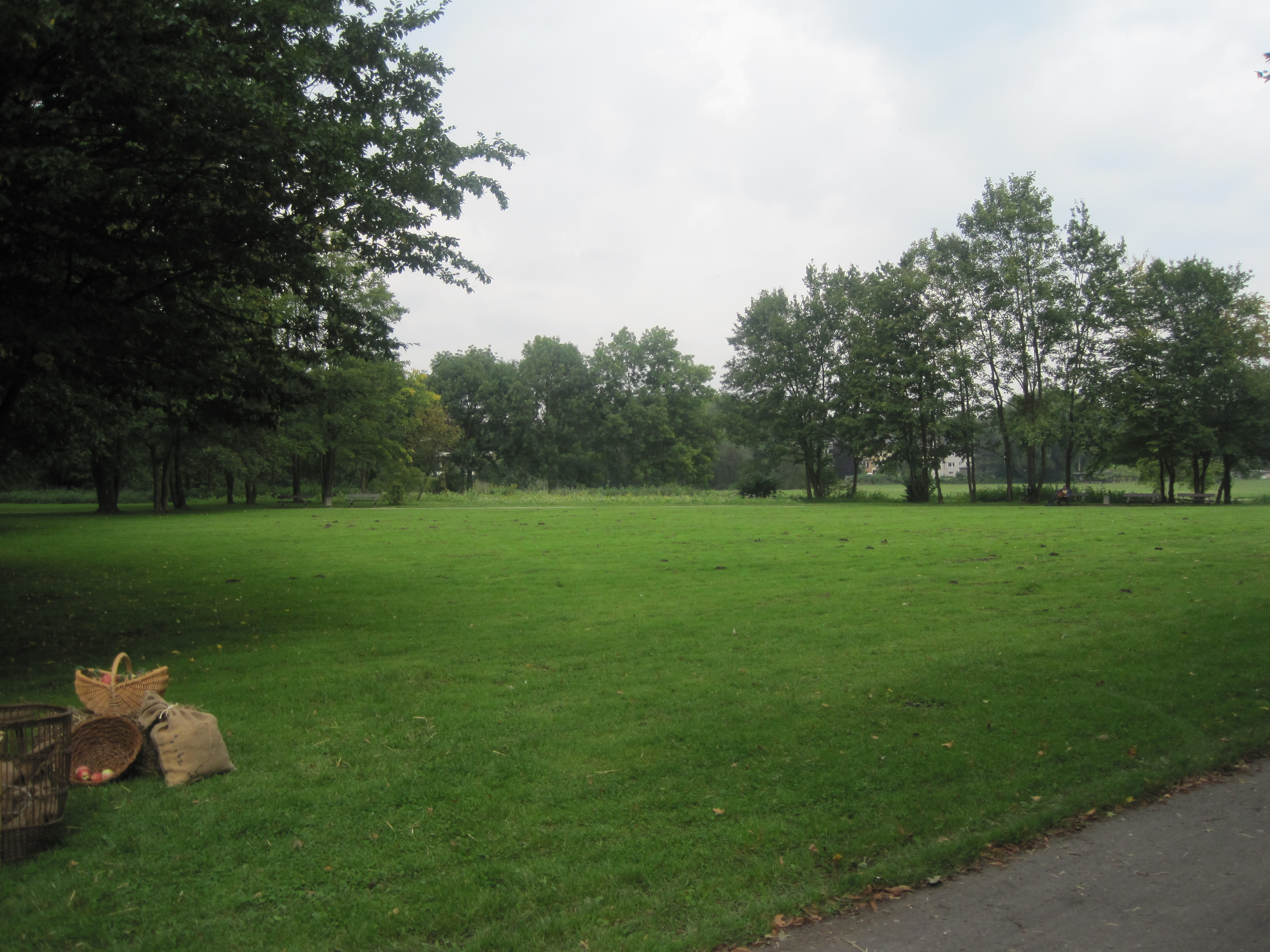 Das Foto zeigt einen Blick auf den Burghügel Mark in Hamm am Tag des offenen Denkmals, 12. September 2010.